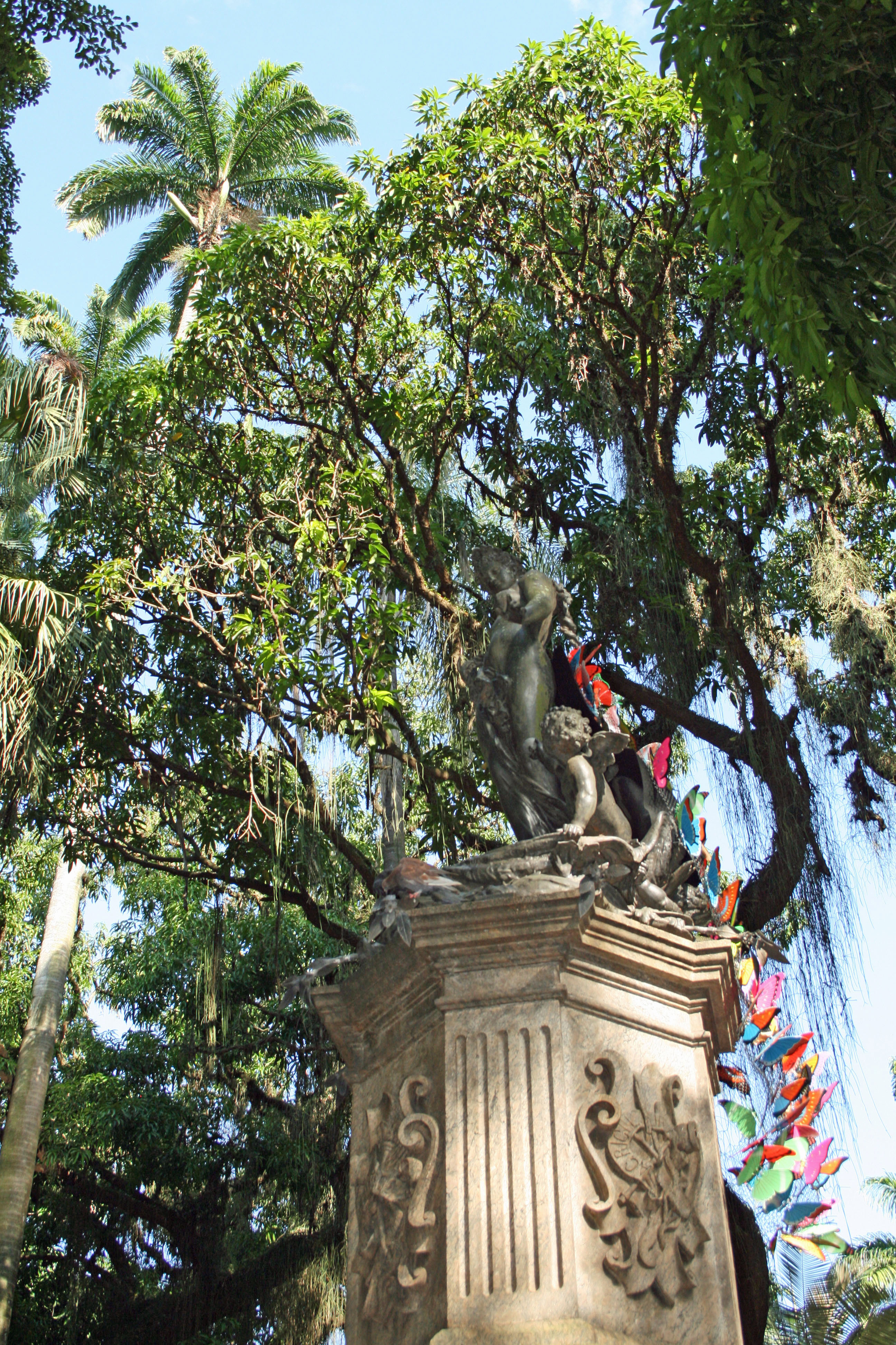 O Chafariz do Palácio do Catete